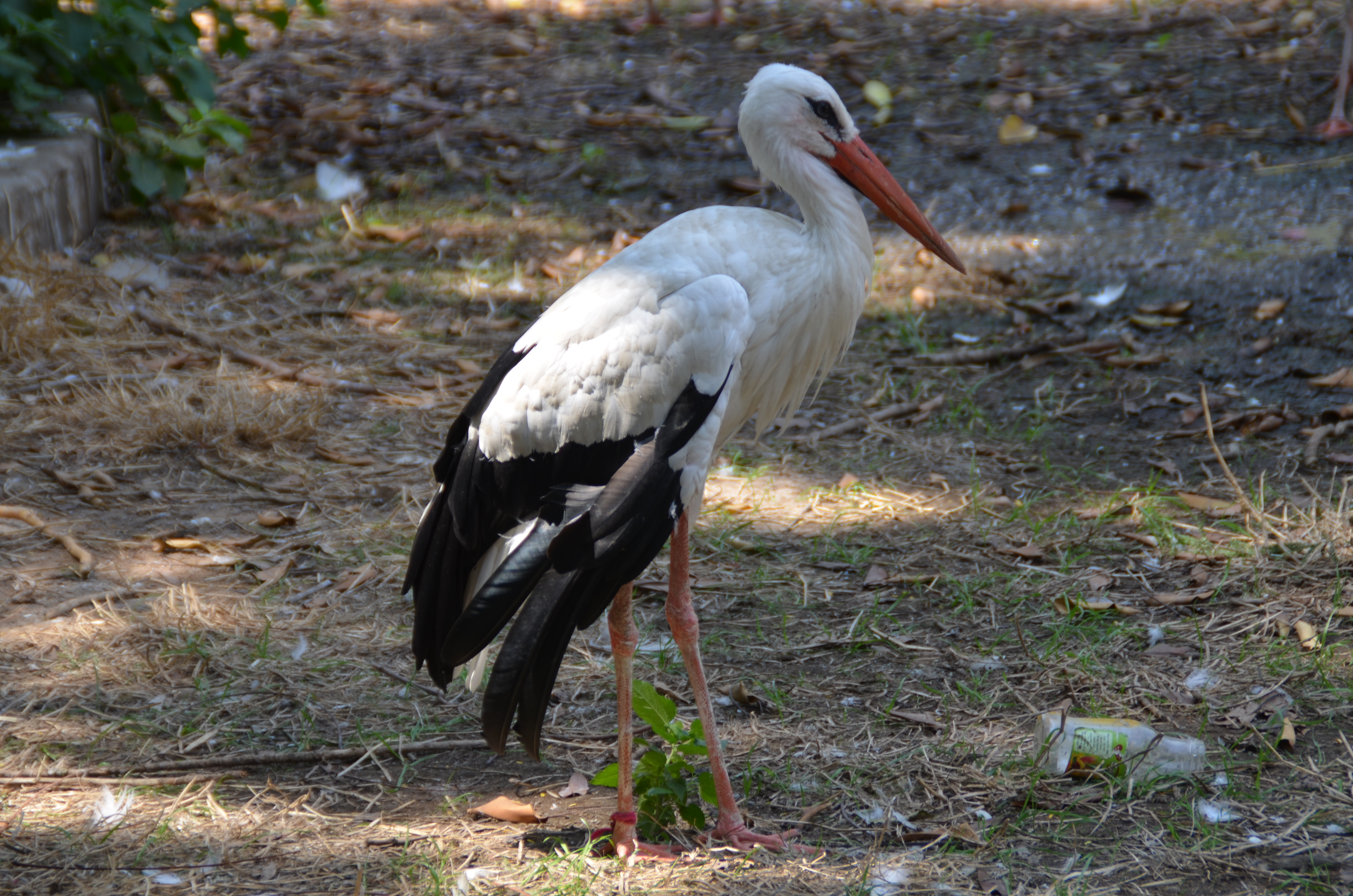 طائر اللقلق في حديقة حيوان الجيزة